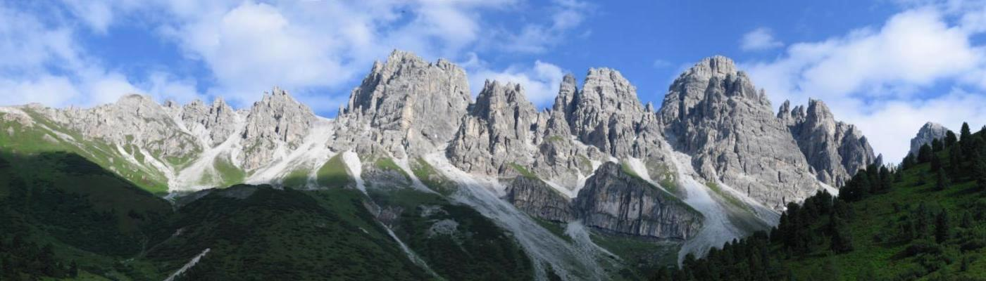 Kalkkögel im Senderstal, Tirol, Österreich.